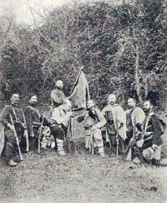 1904 illustration